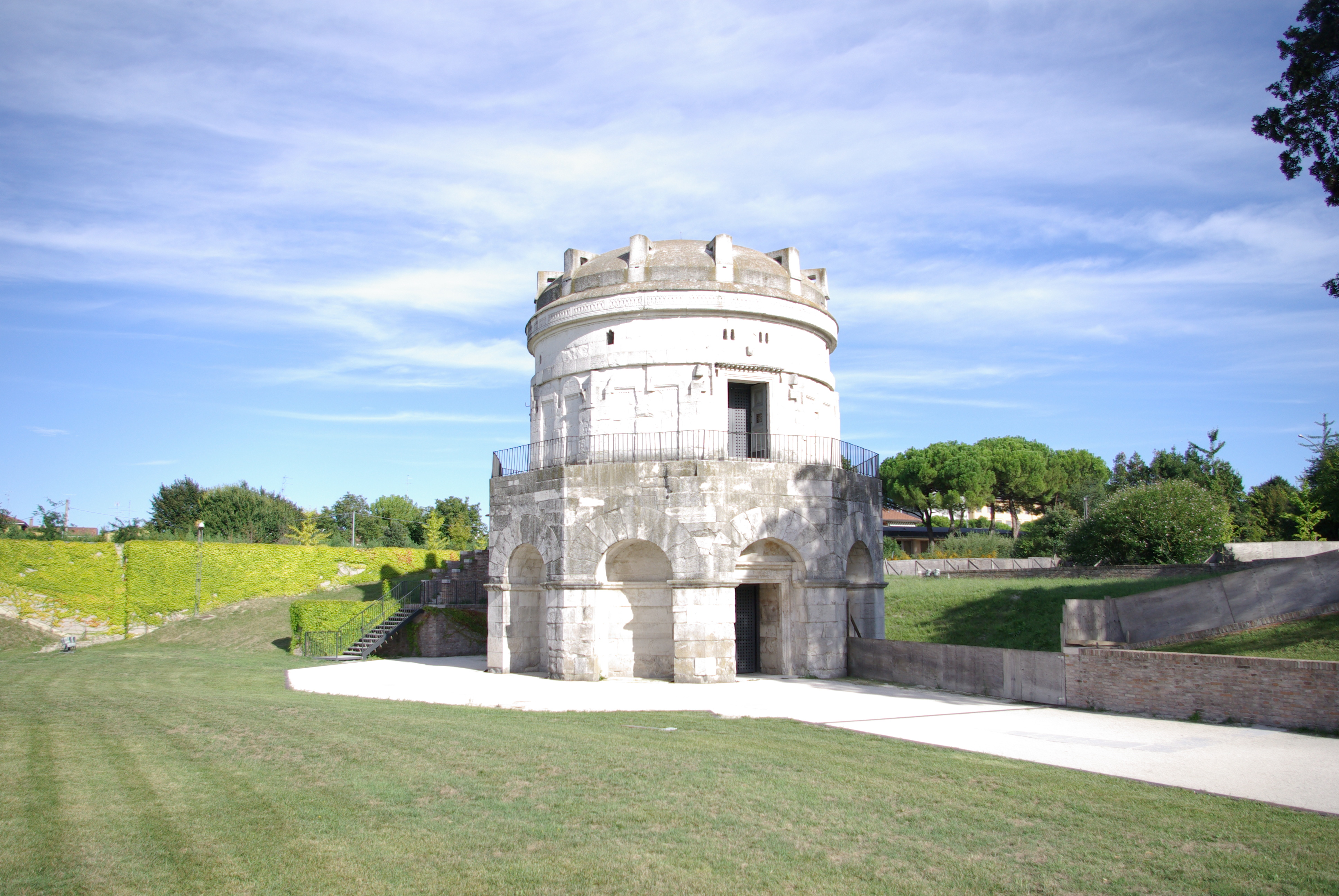 Mausoleo di Teodorico This is a photo of a monument which is part of cultural heritage of Italy.